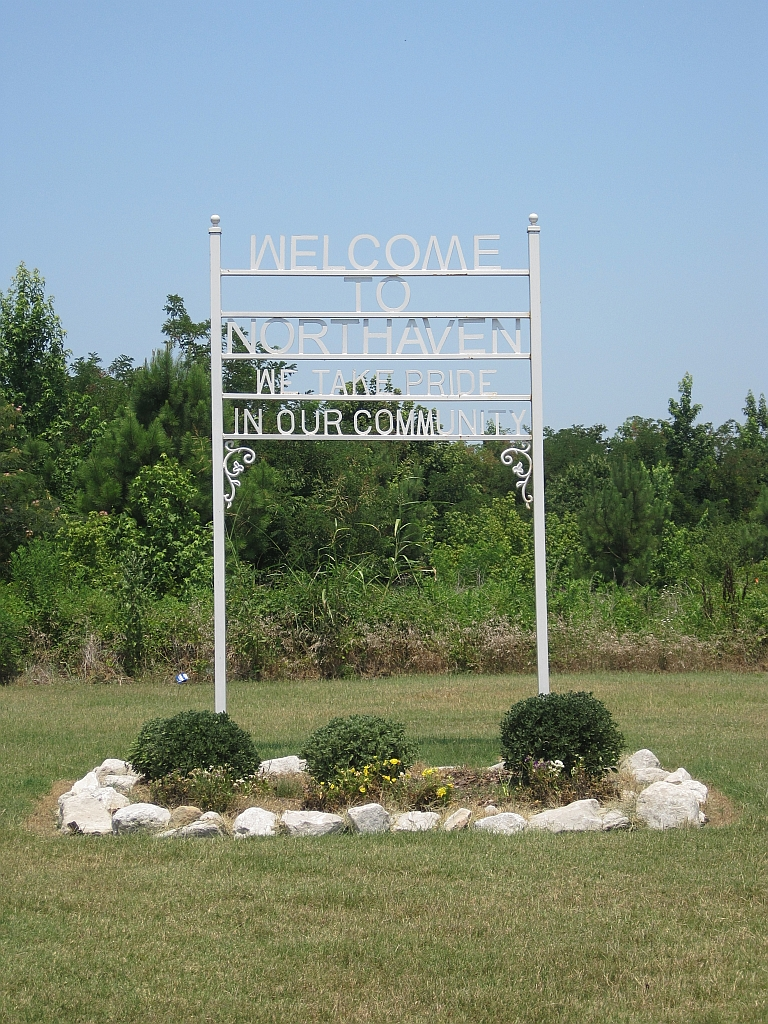 Northaven, Tennessee